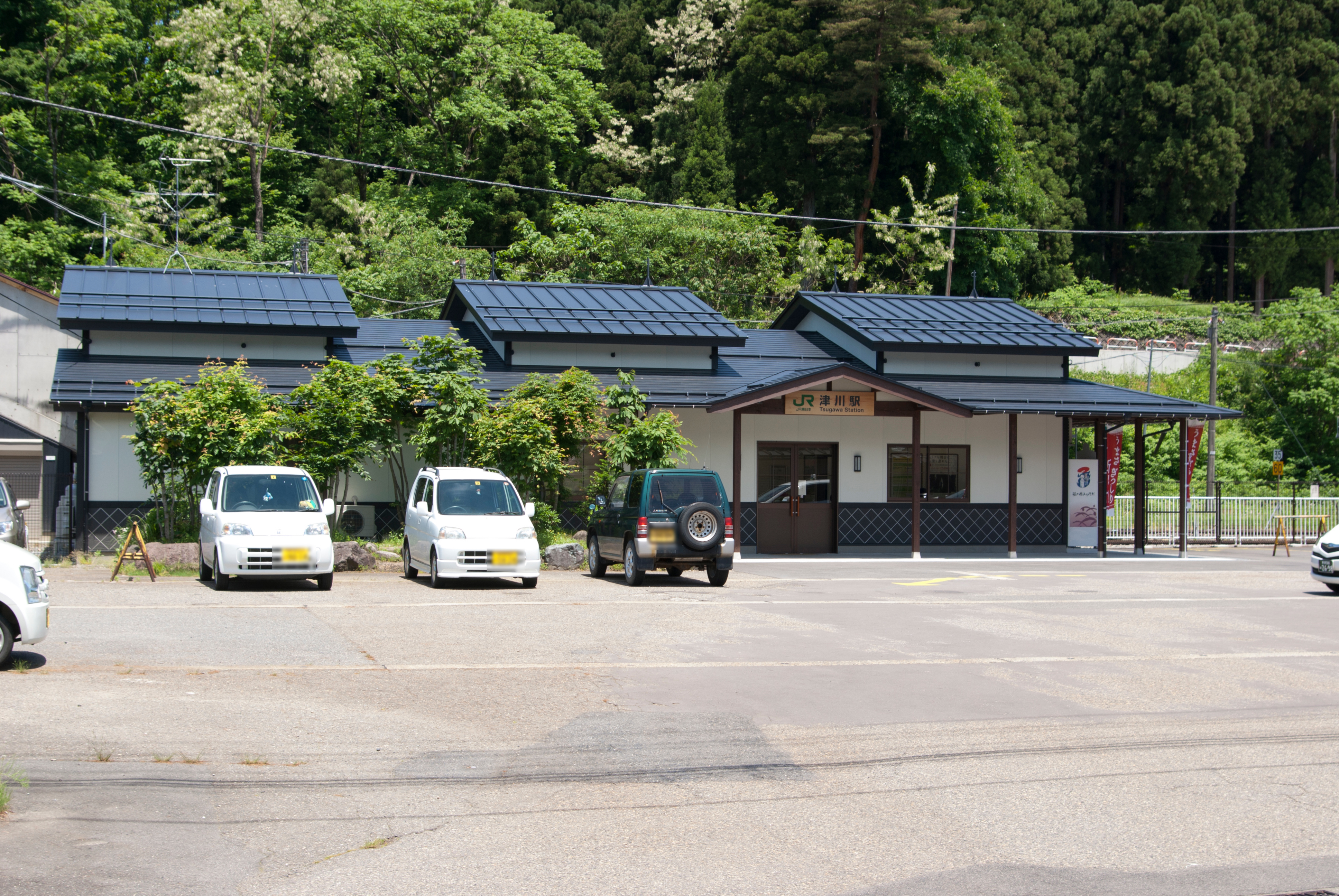 東日本旅客鉄道株式会社磐越西線津川駅